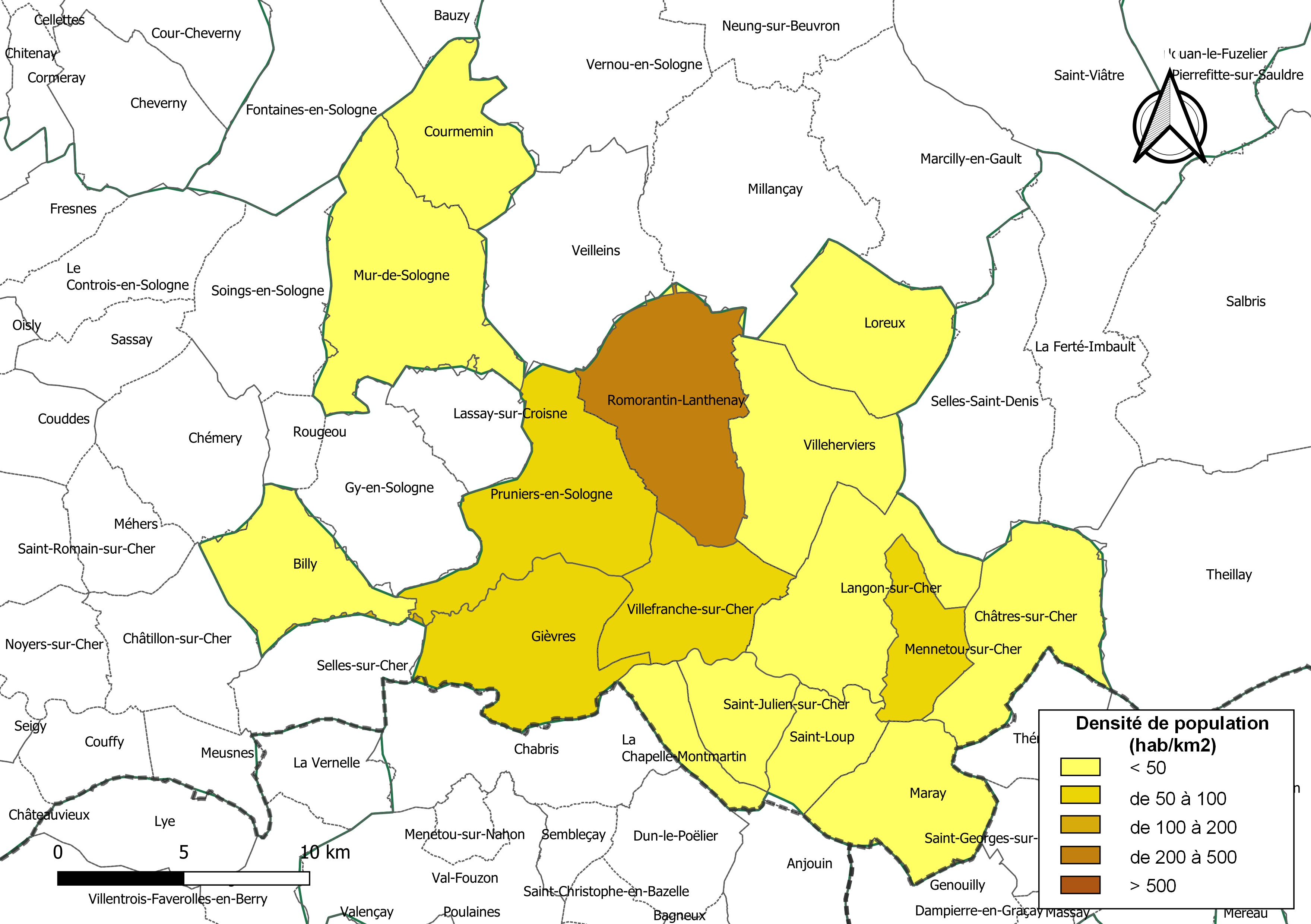 Carte des densités de population (millésimée 2016) des communes de la communauté de communes la Communauté de communes du Romorantinais et du Monestois, département de Loir-et-Cher, France. Composition au 1er janvier 2019.